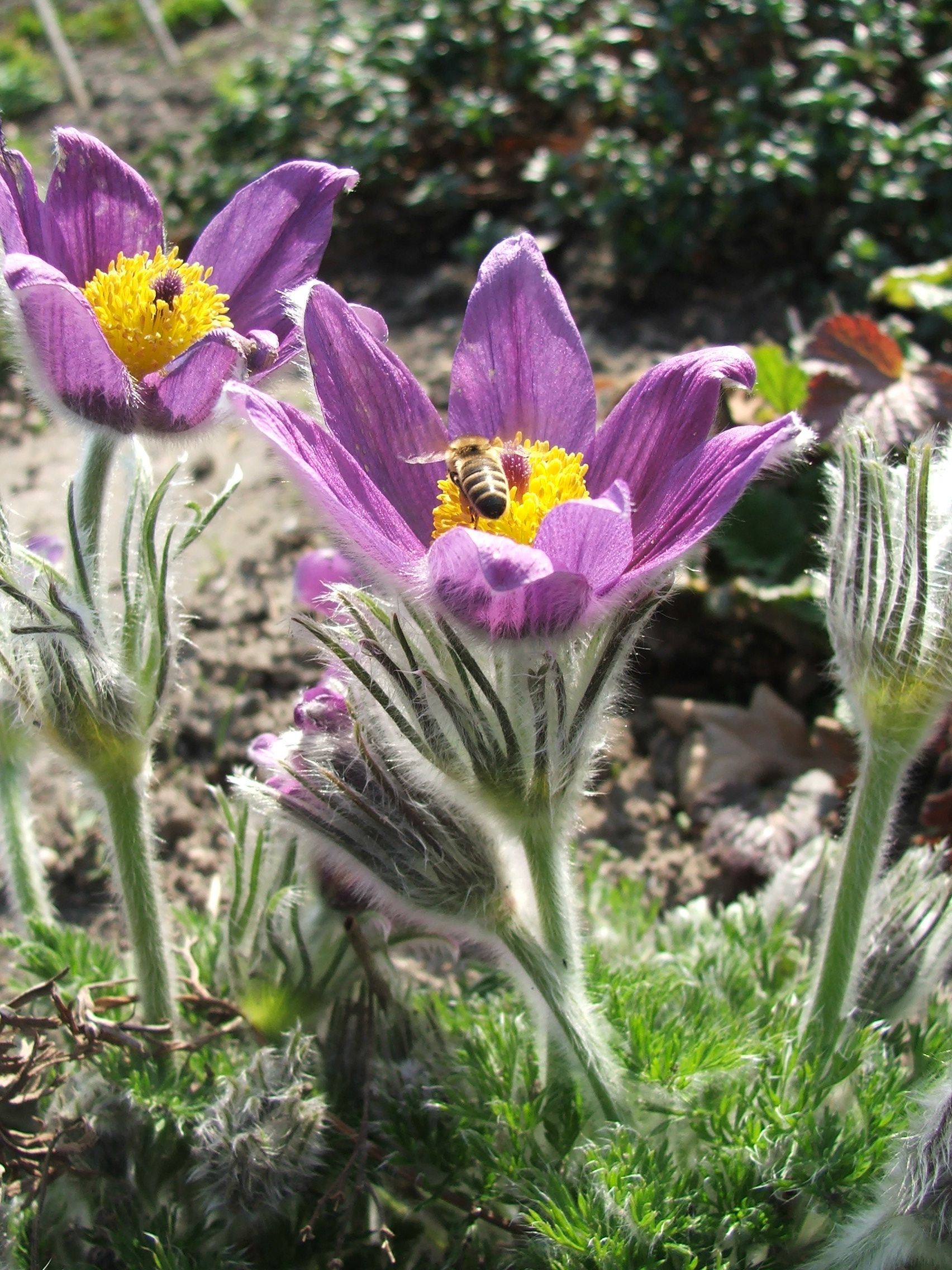 Pulsatilla gayeri Simk. - MTA Botanic Garden Vácrátót, Hungary